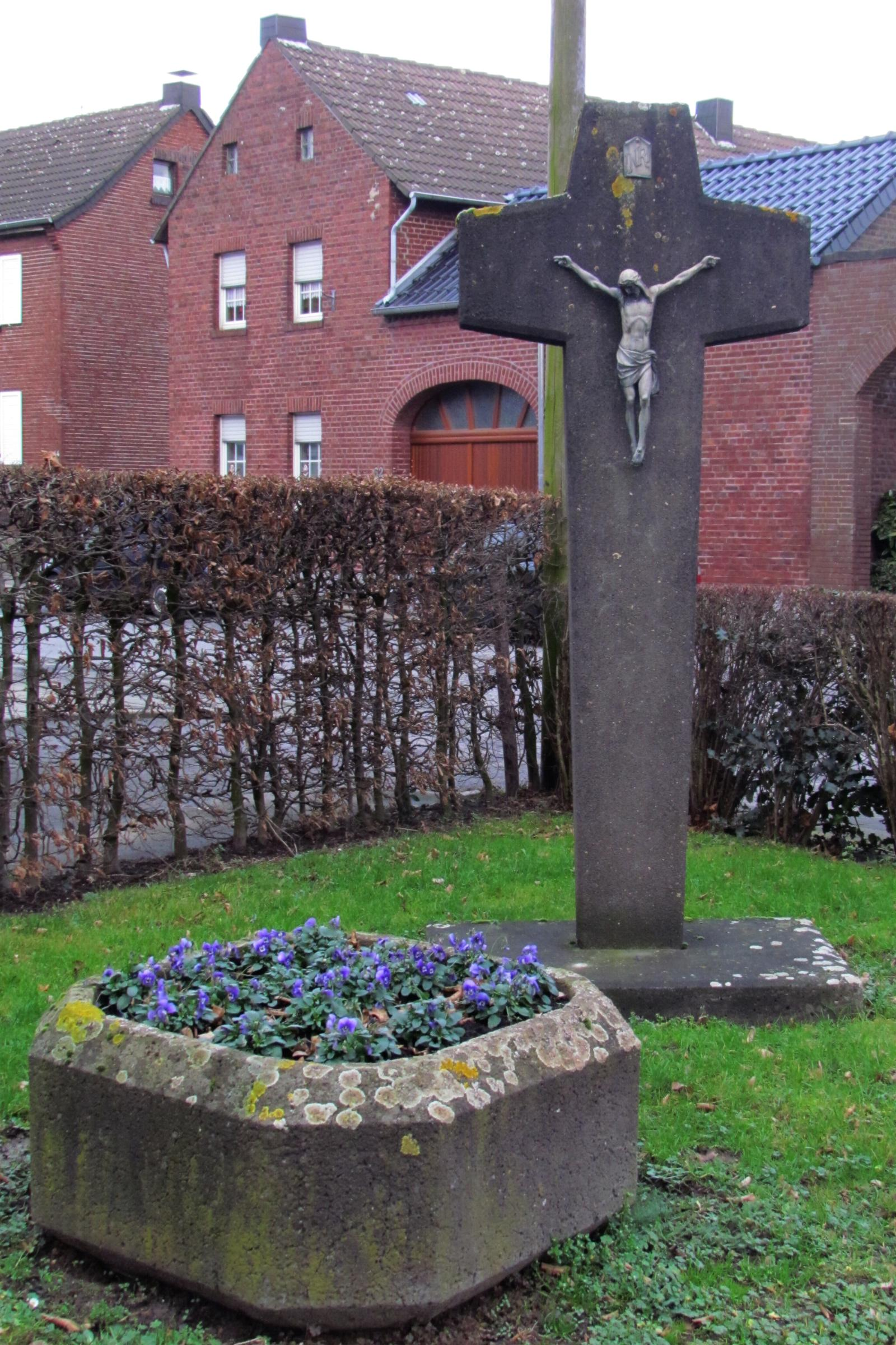 Wegkreuz in Tripsrath